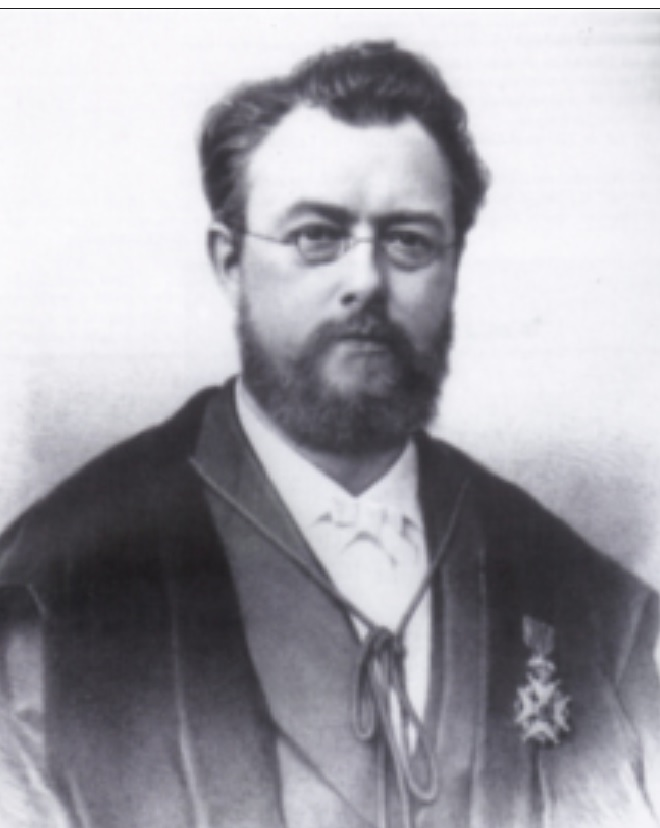 Théodore Swarts (* 9. Mai 1839, Antwerpen, Belgien; † 31. August 1911, Kortenberg, Belgien) at University of Ghent